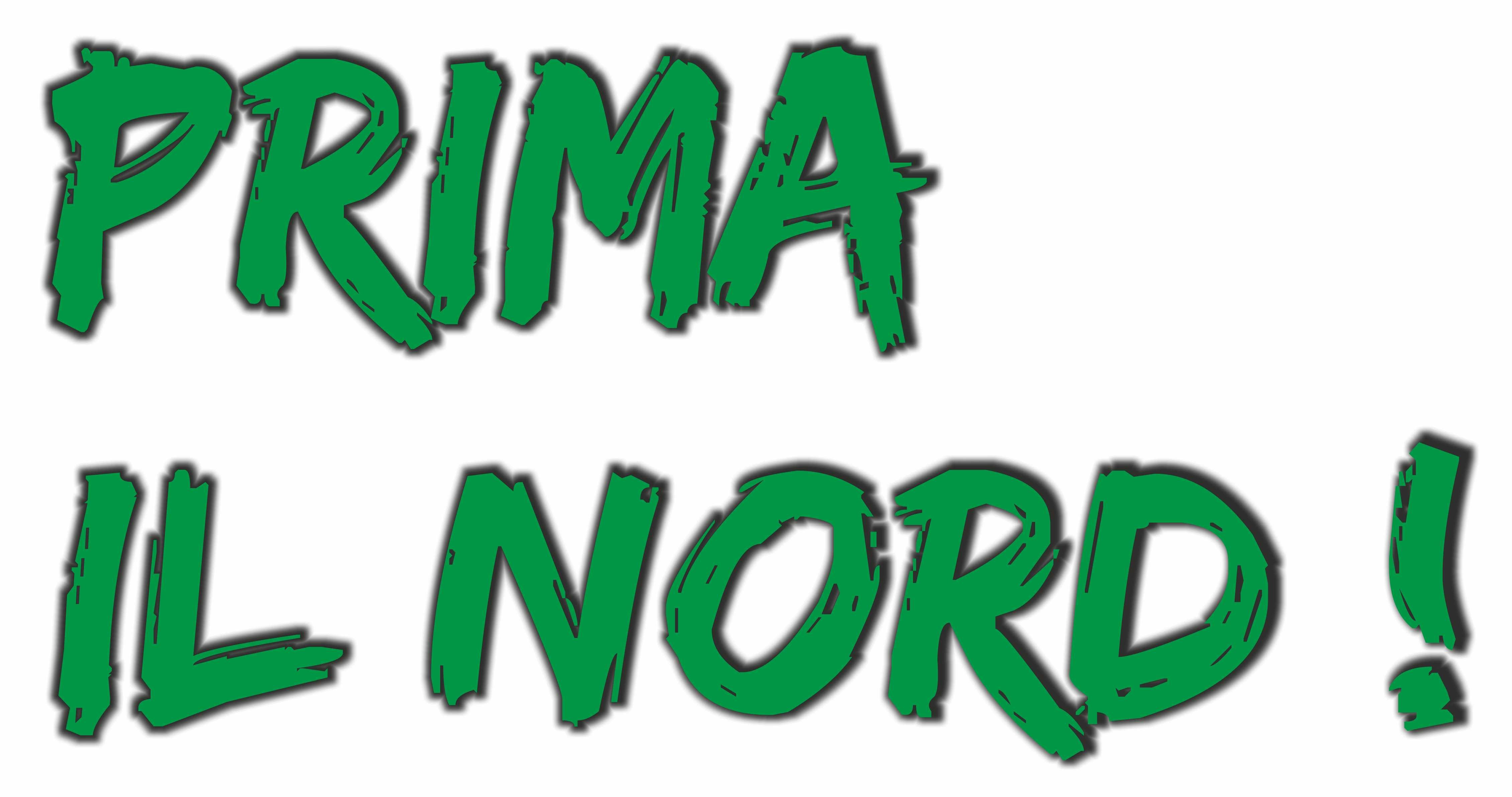 Slogan utilizzato dalla Lega Nord durante e dopo il Congresso Federale del 30 giugno - 1 luglio 2012.